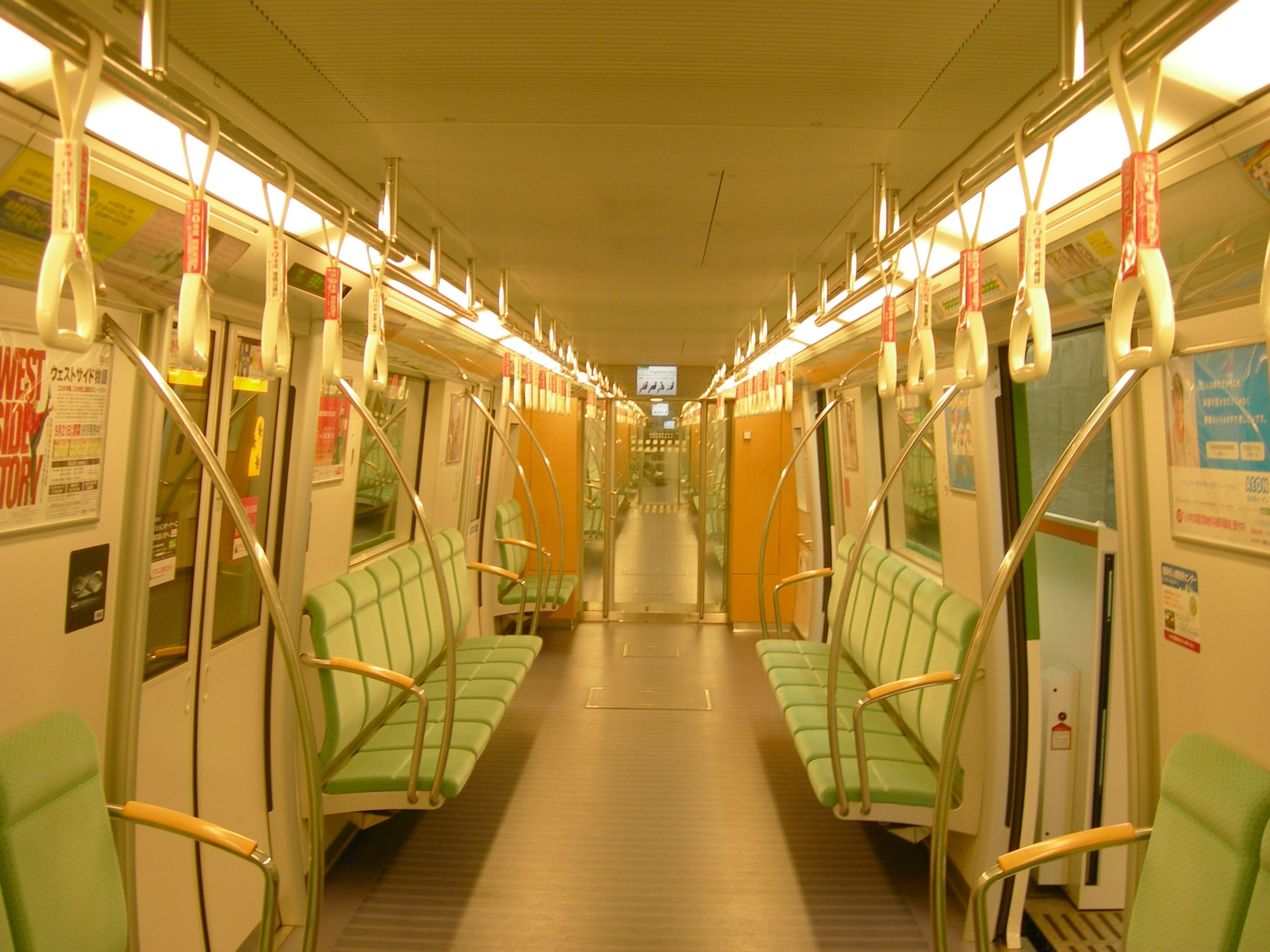 福岡市交通局3000系 車内